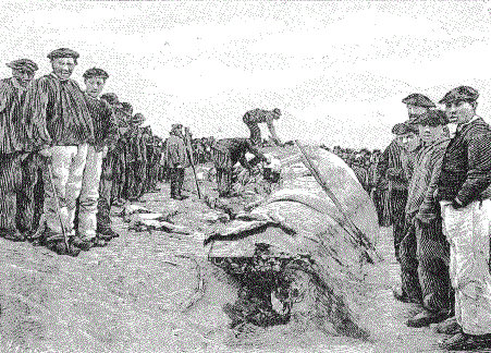 Loctudy : dépeçage d'une baleine échouée le 10 janvier 1894 sur la plage de Karafédé et dont le squelette fut transporté au muséum d'histoire naturelle de Paris